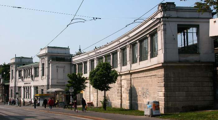 Stadtbahnstation Gumpendorfer Straße (U6)